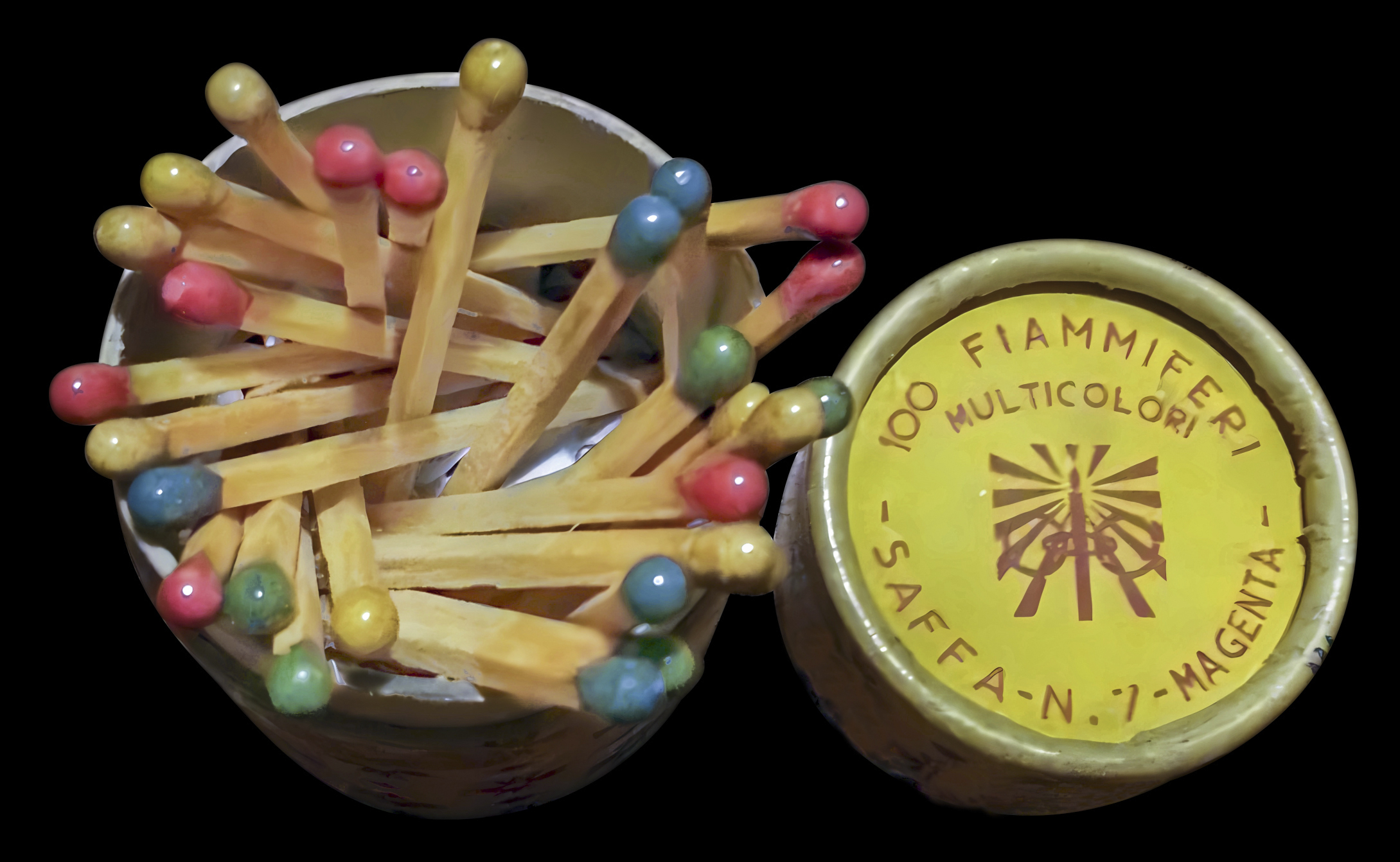 Farbige Überallzündhölzer